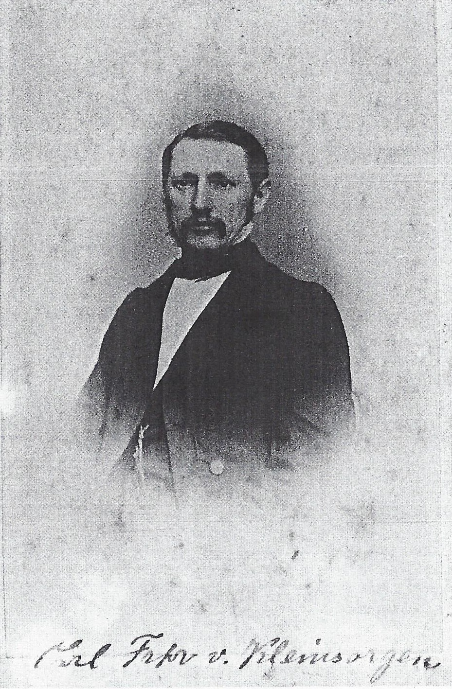 Signierte Porträtfotografie des Karl Freiherrn von Kleinsorgen (1829-1889)